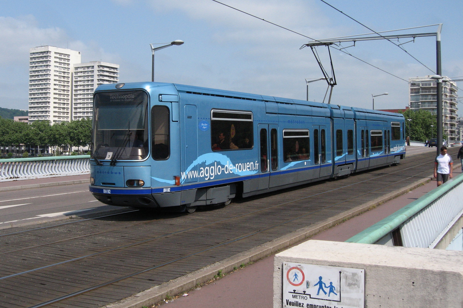 Tramway TFS n°804 de Rouen, sur le pont Jeanne d'Arc